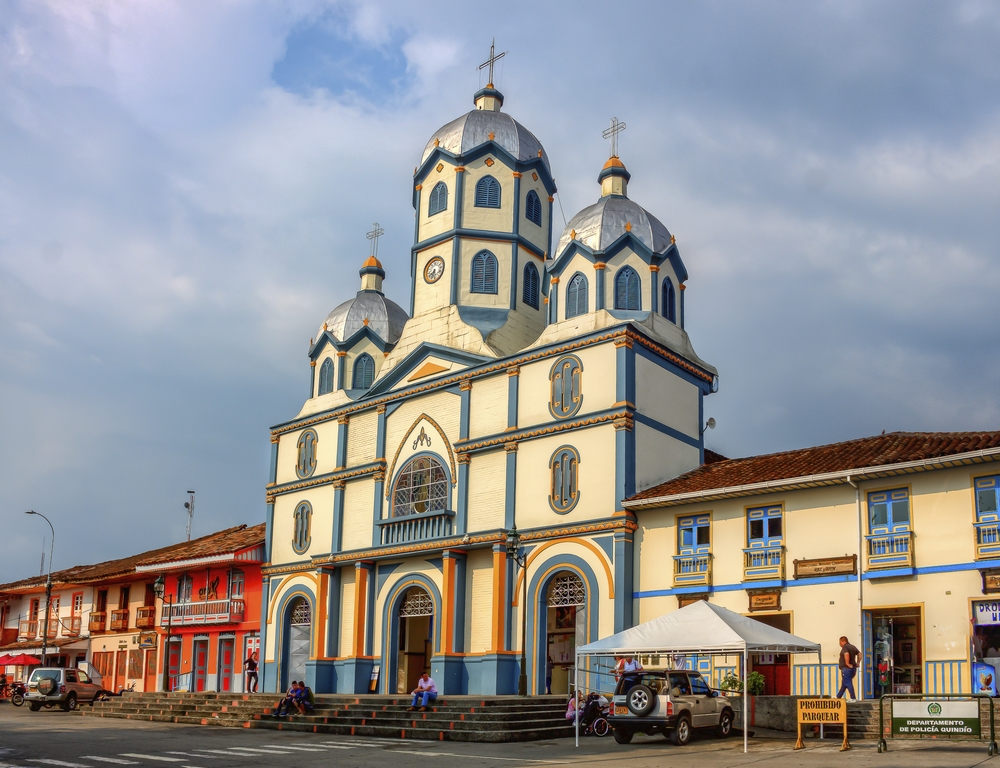 el lugar central de filandia, quindio